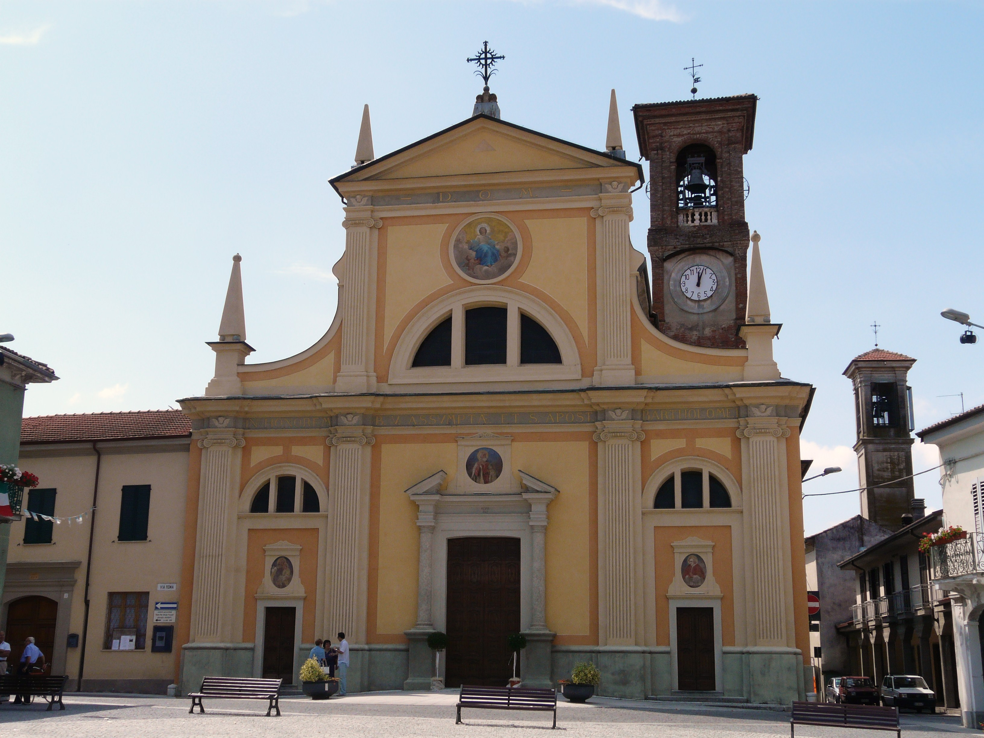 Chiesa dell'Assunta di Viguzzolo, Piemonte, Italia